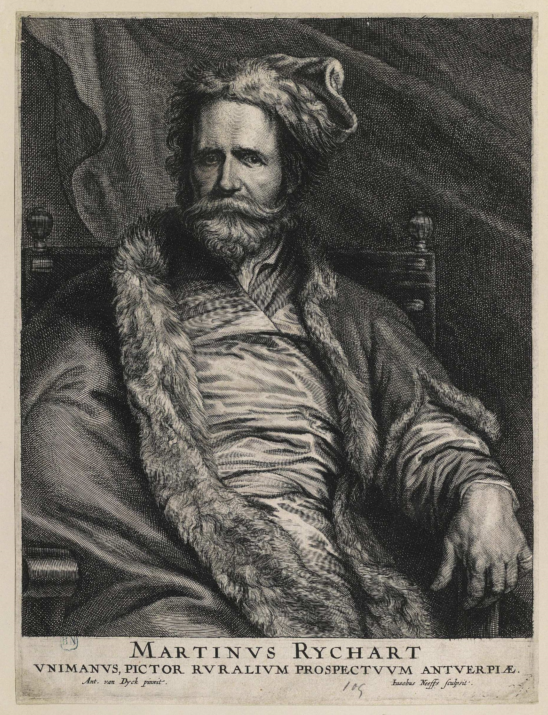 Retrato de Martin Ryckaert, aguafuerte y buril firmado: "Ant. Van Dyck pinxit; Iacobus Neefs sculpsit.". Biblioteca Nacional de España